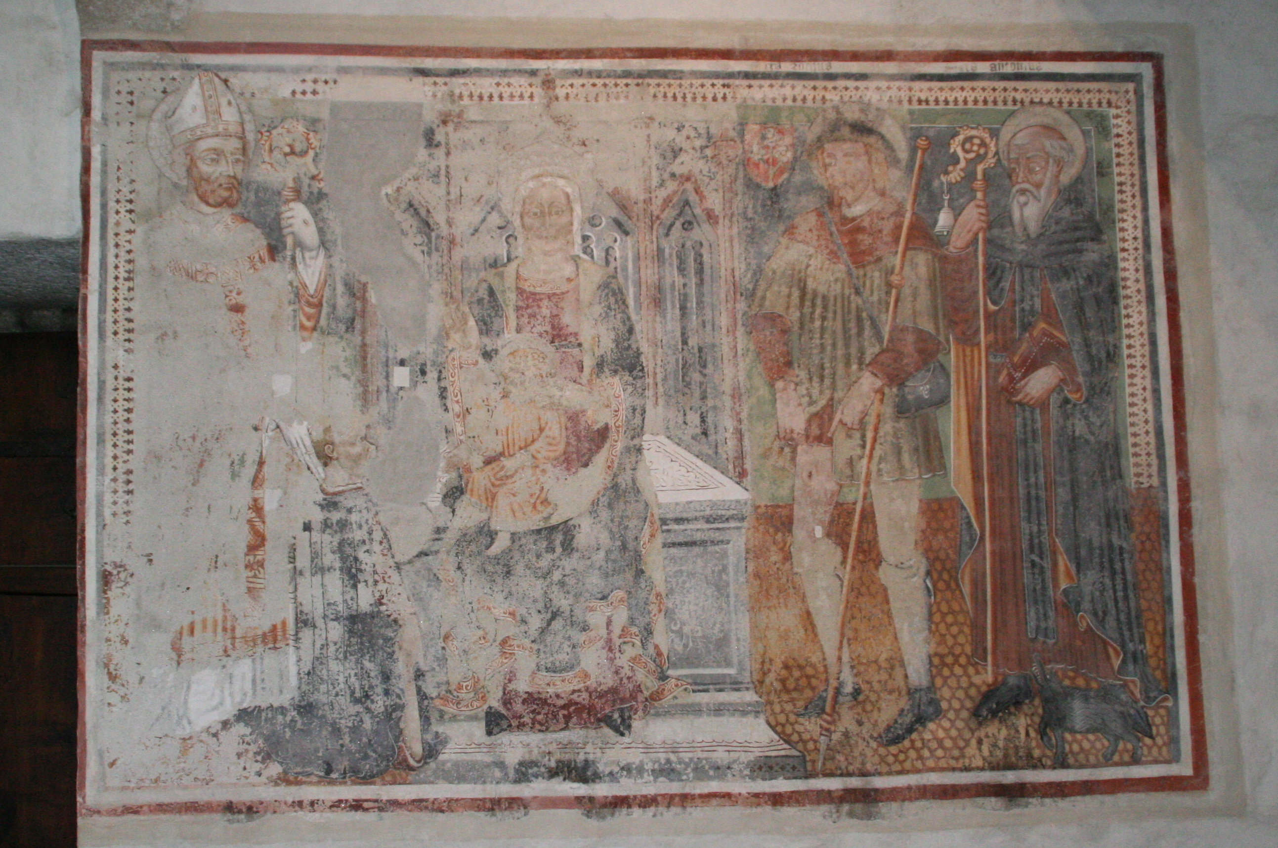 Kirche San Pietro e Paolo (Biasca) Fresken an der Südseite